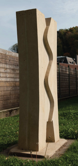 Sculptur "Ouni Grenzen", steet zu Rëmeleng am Park Fonderie